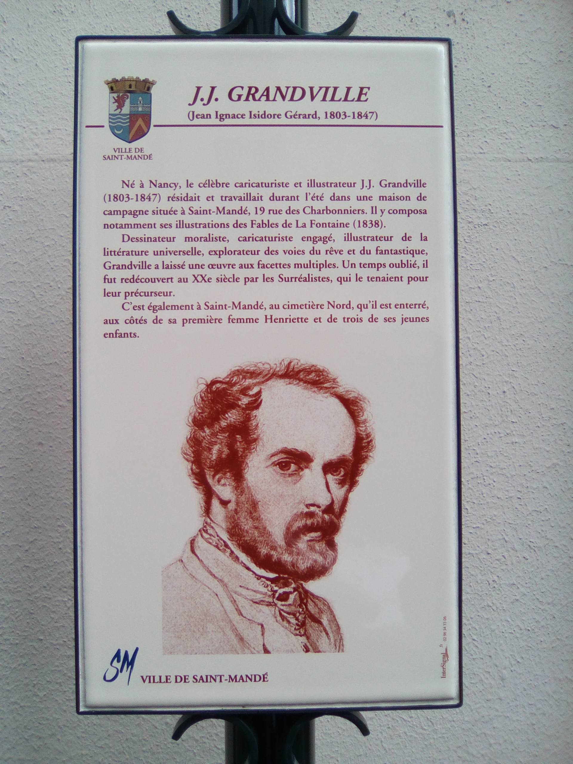 Plaque commémorative en honneur de Grandville, rue Granville à Saint-Mandé (94)